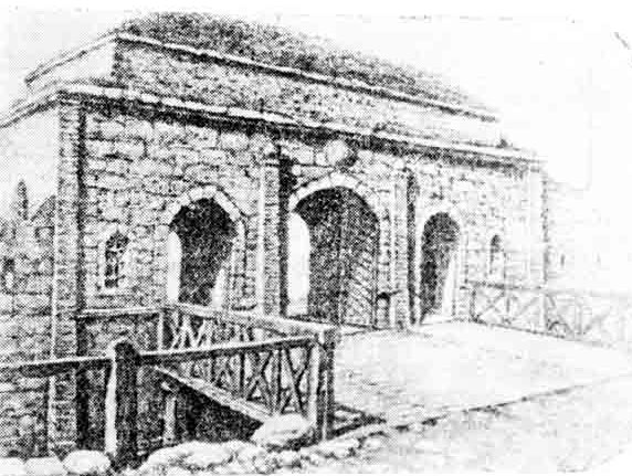 Stanbol Gate , Belgrade